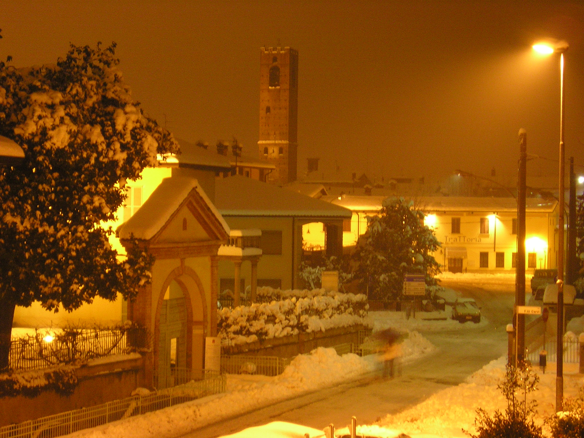 Paolo Ghilardi, Mozzanica sotto la neve, licenza libera rilasciata da me, scattata il 27/01/2006